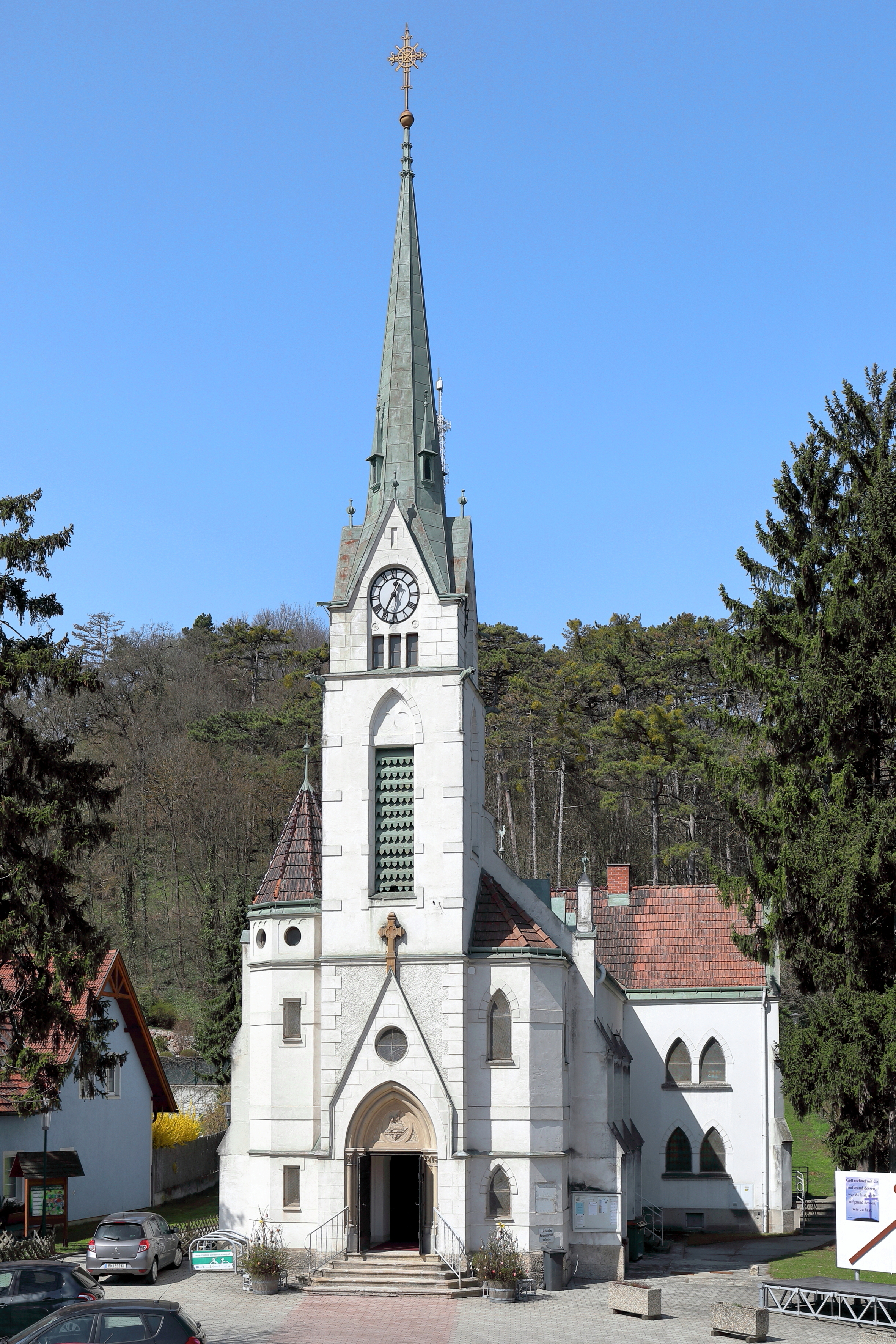 Die röm.-kath. Pfarrkirche hl. Elisabeth in der niederösterreichischen Gemeinde Hirtenberg.